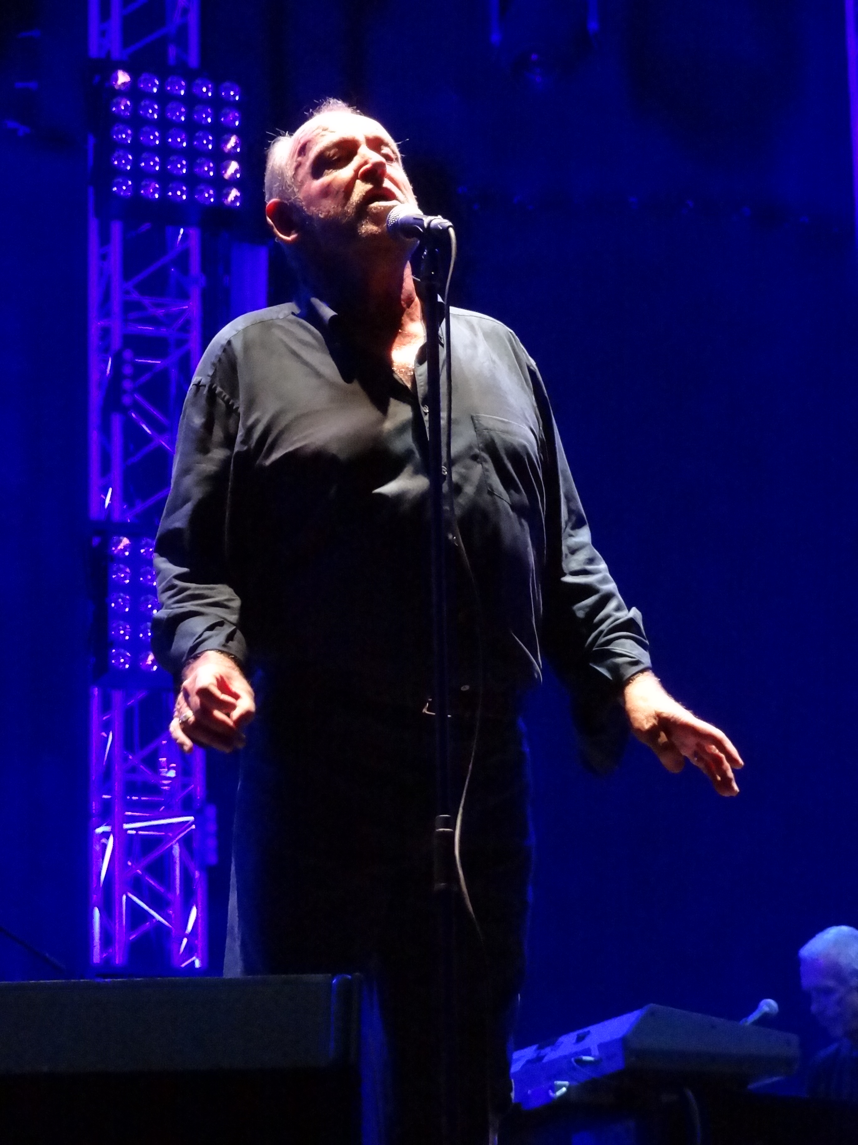 Концерт британского певца Джо Кокера в рамках X Международного инвестиционного форума в Сочи.